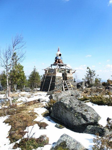 Буддийский храм на горе Качканар